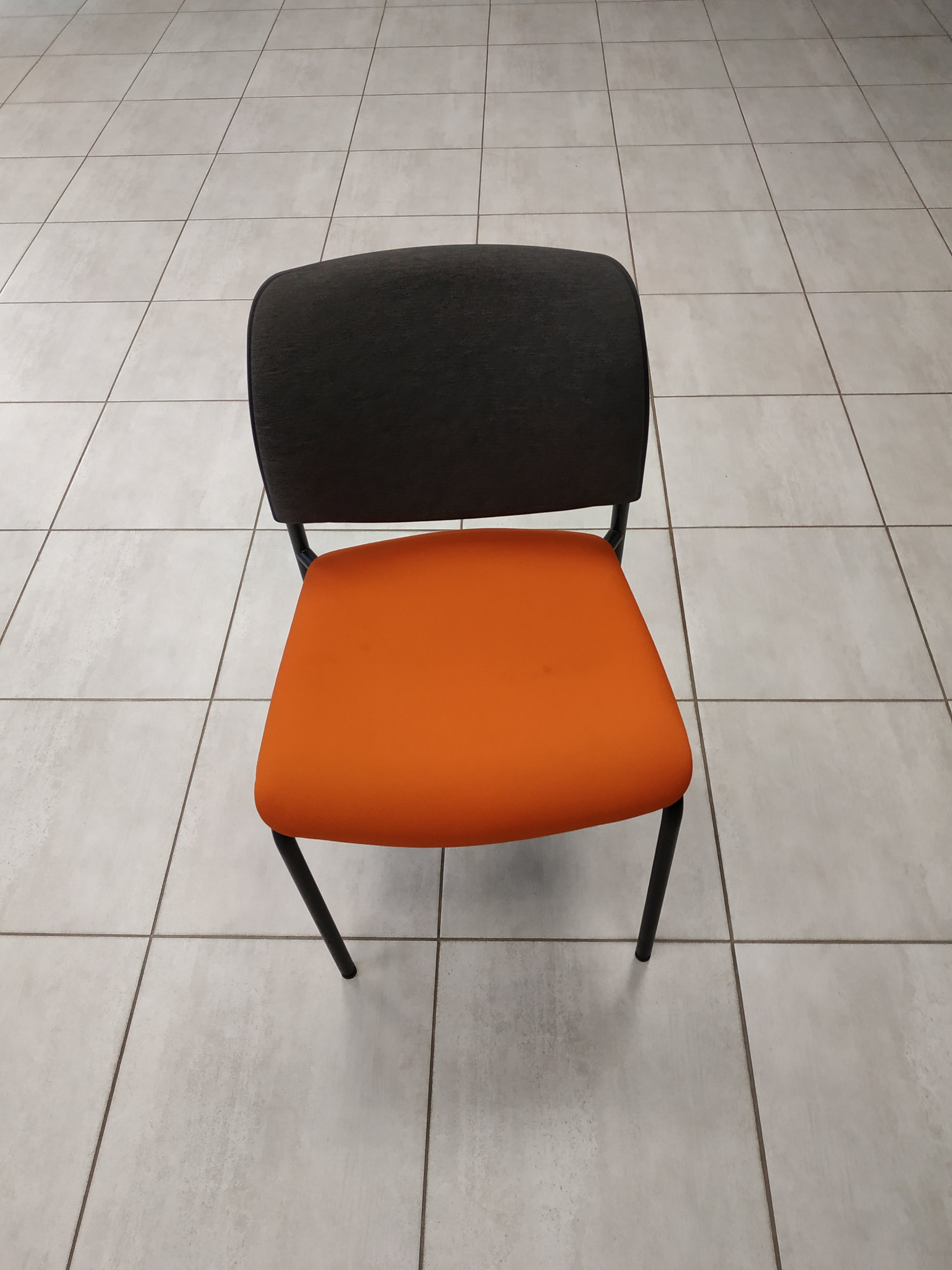 Krzesło szaro-pomarańczowe